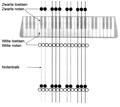 Afbeelding afkomstig uit introductie materiaal van de Stichting Klavarskribo, gebruikt in overleg.